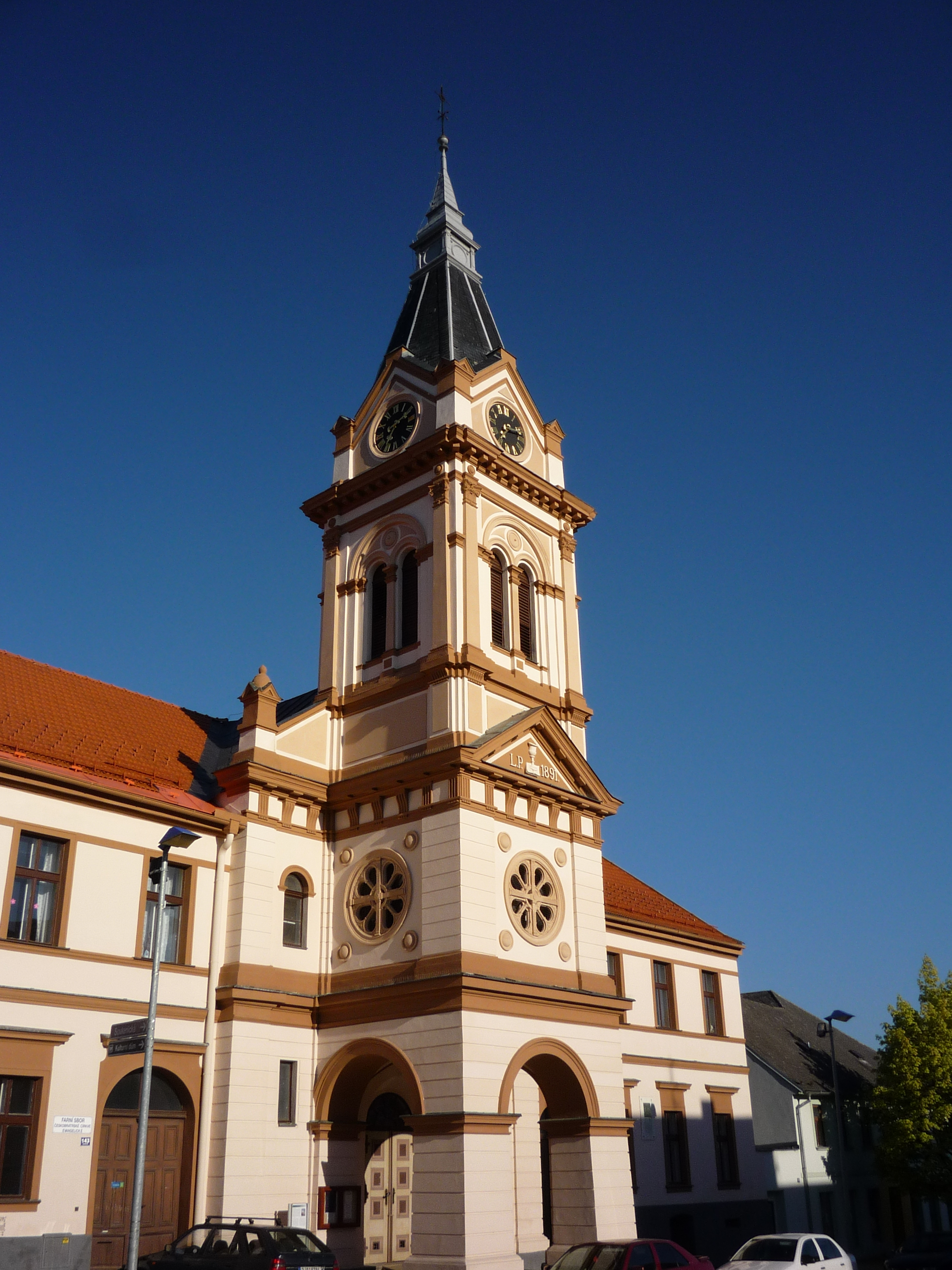 Autor fotografie Jiří Zelenka. Evangelický kostel - chráněná kulturní památka České republiky. Husova ulice. Humpolec. Okr. Pelhřimov. Kraj Vysočina. Czech Republik.